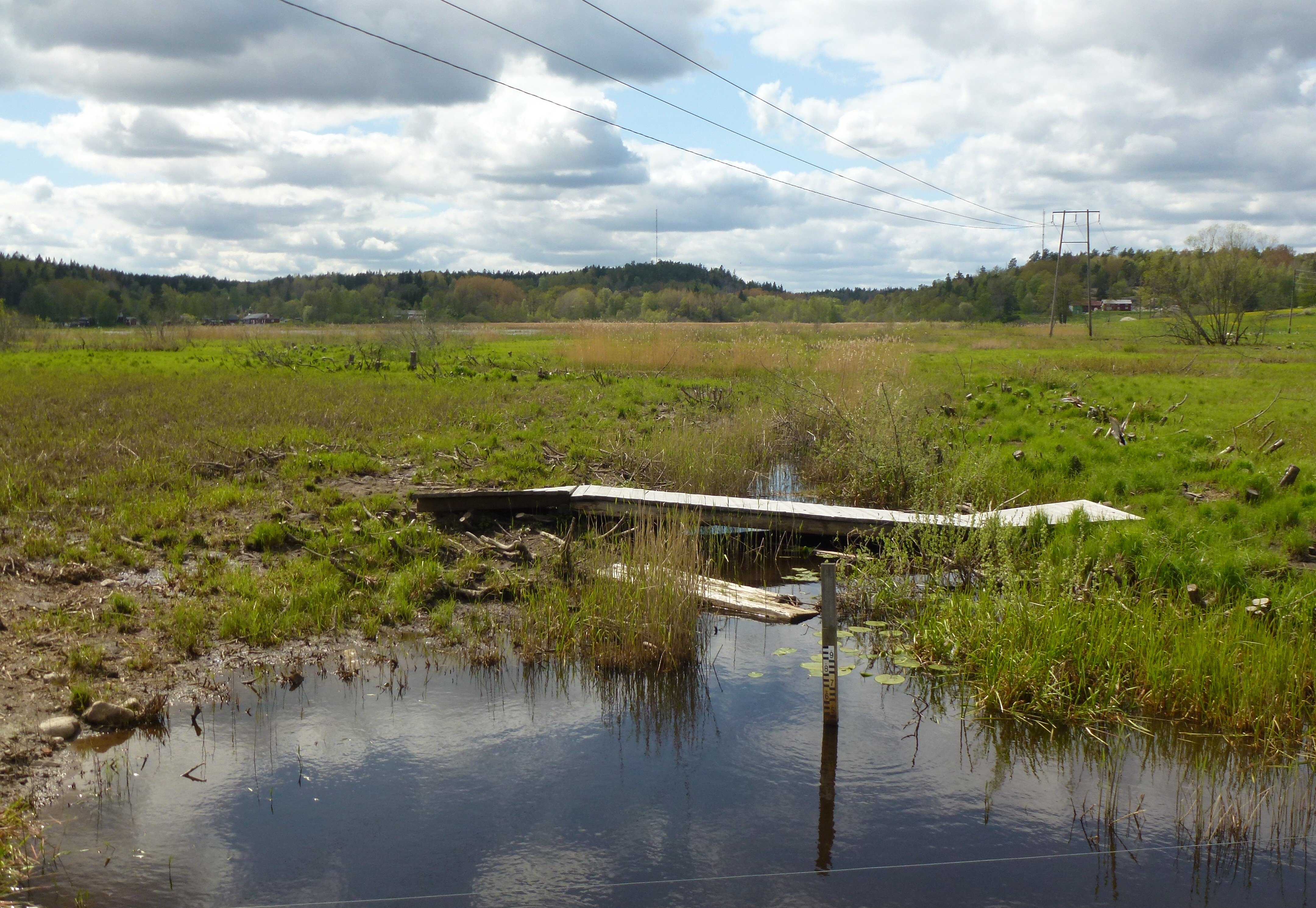 Lissmaån, utflödet av Lissmasjön